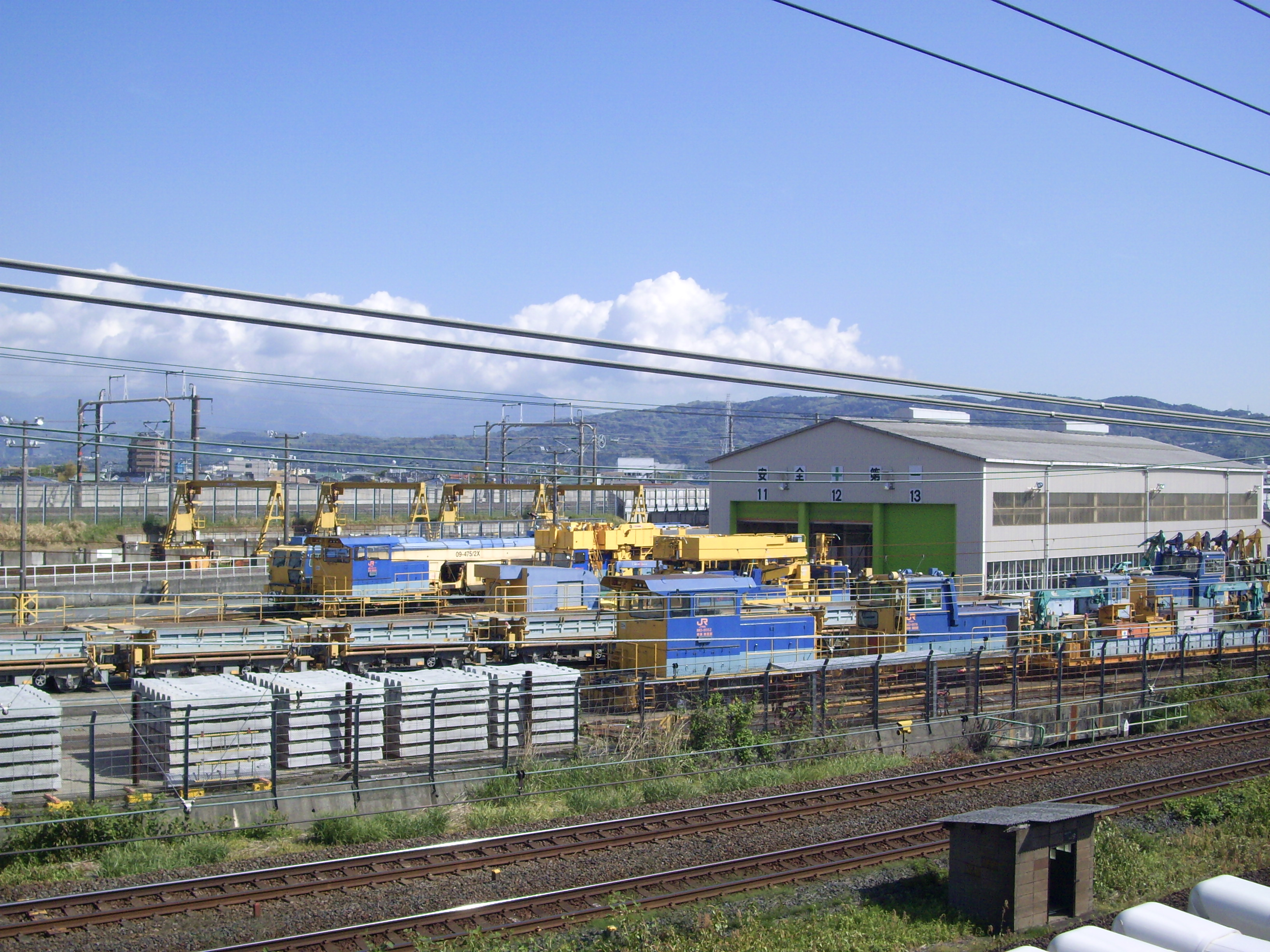 東海道新幹線鴨宮モデル線基地として造られ、開業後は保線所となった鴨宮保守基地。手前を通過するのは東海道線、新幹線は基地を挟んだ奥側を走る ㊟カメラを起動すると日付機能が出荷時のものに初期化されるため、ファイル履歴の撮影日時とメタデータの原画像データの生成日時が異なります